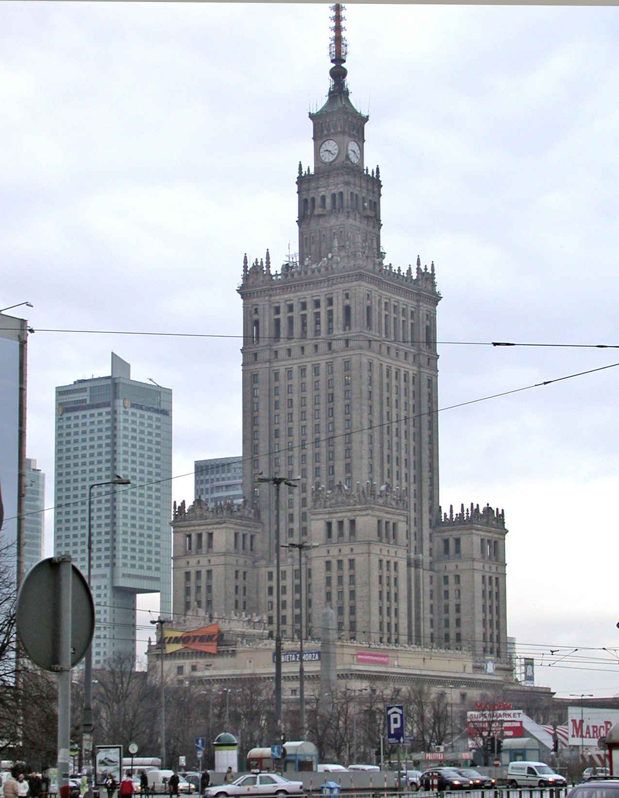 Varsavia, Palazzo della Cultura e della Scienza (Pałac Kultury i Nauki) su piazza Defilad (plac Defilad).